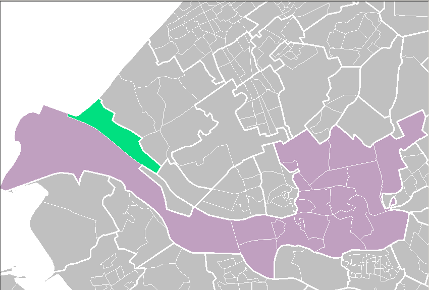 Rotterdam districts/neighboorhoods